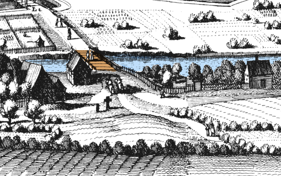 Lindener Brücke auf Kupferstich von 1654 mit dem Titel „F. B. L. ((Kur-)Ffürstentum Braunschweig-Lüneburg) Residenz Stadt Hannover“, im Bildvordergrund das Dorf links Linden mit der wohl ältesten bekannten Darstellung der Ihmebrücke, In der Bildmitte vorne die Mühle auf dem Lindener Berg. Die Künstlersignaturen am unteren Bildrand lauten „Conr. Buno delineavit, Casp Merian fec.“ ...